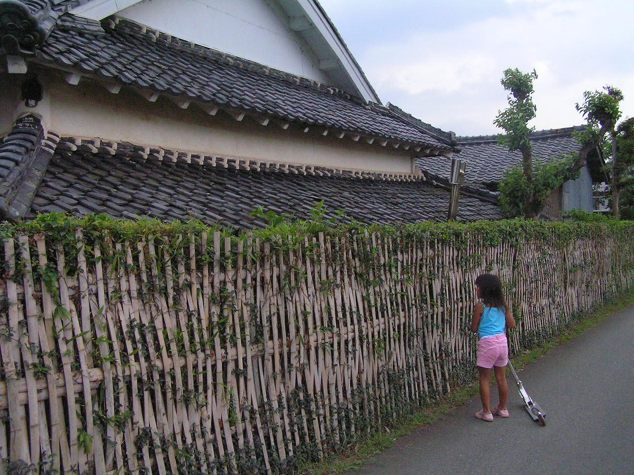 竹垣のある古民家